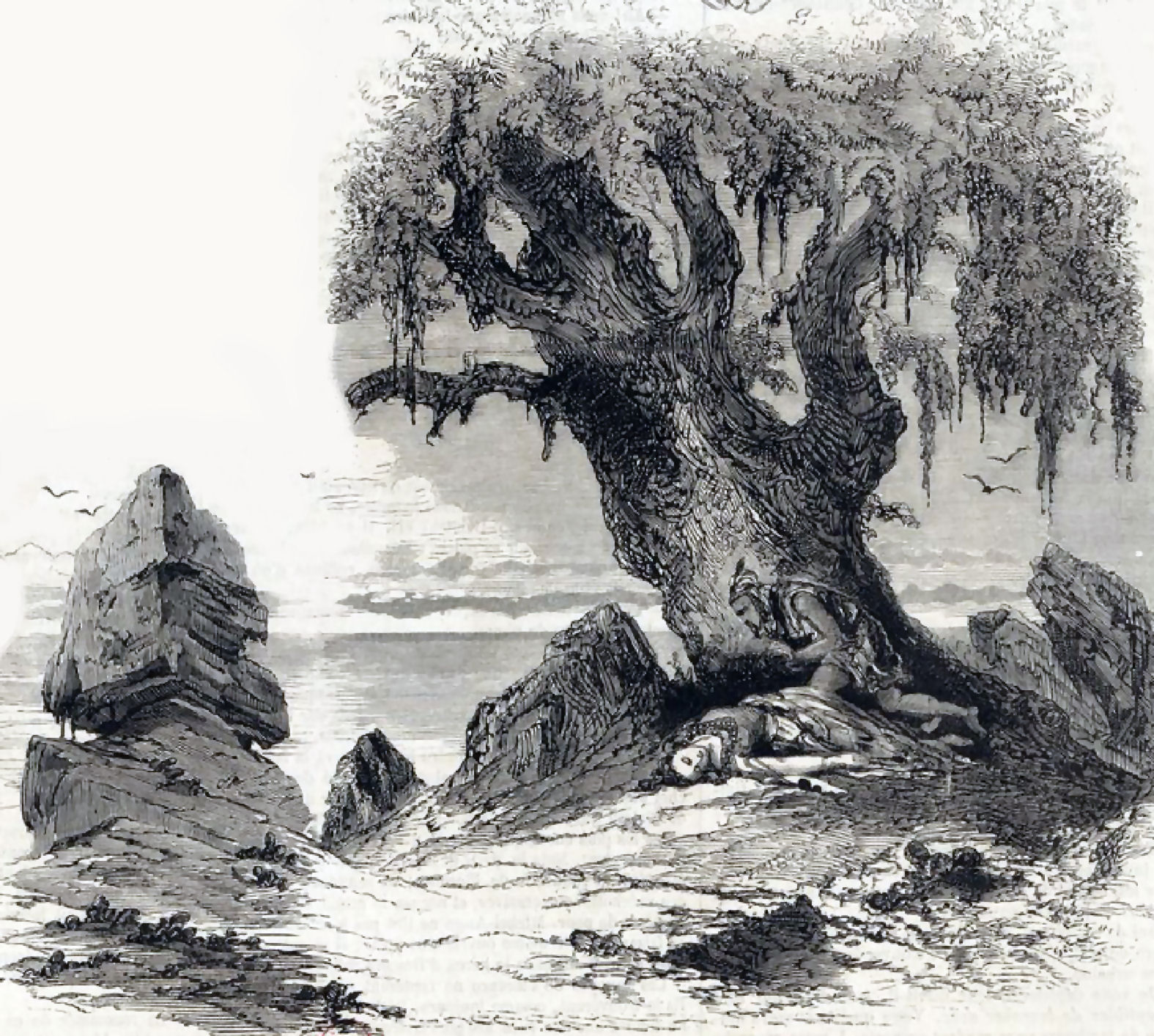 Acte V de L'Africaine de Meyerbeer